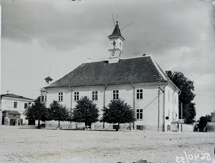 Kuressaare raekoda, u 1900-1910